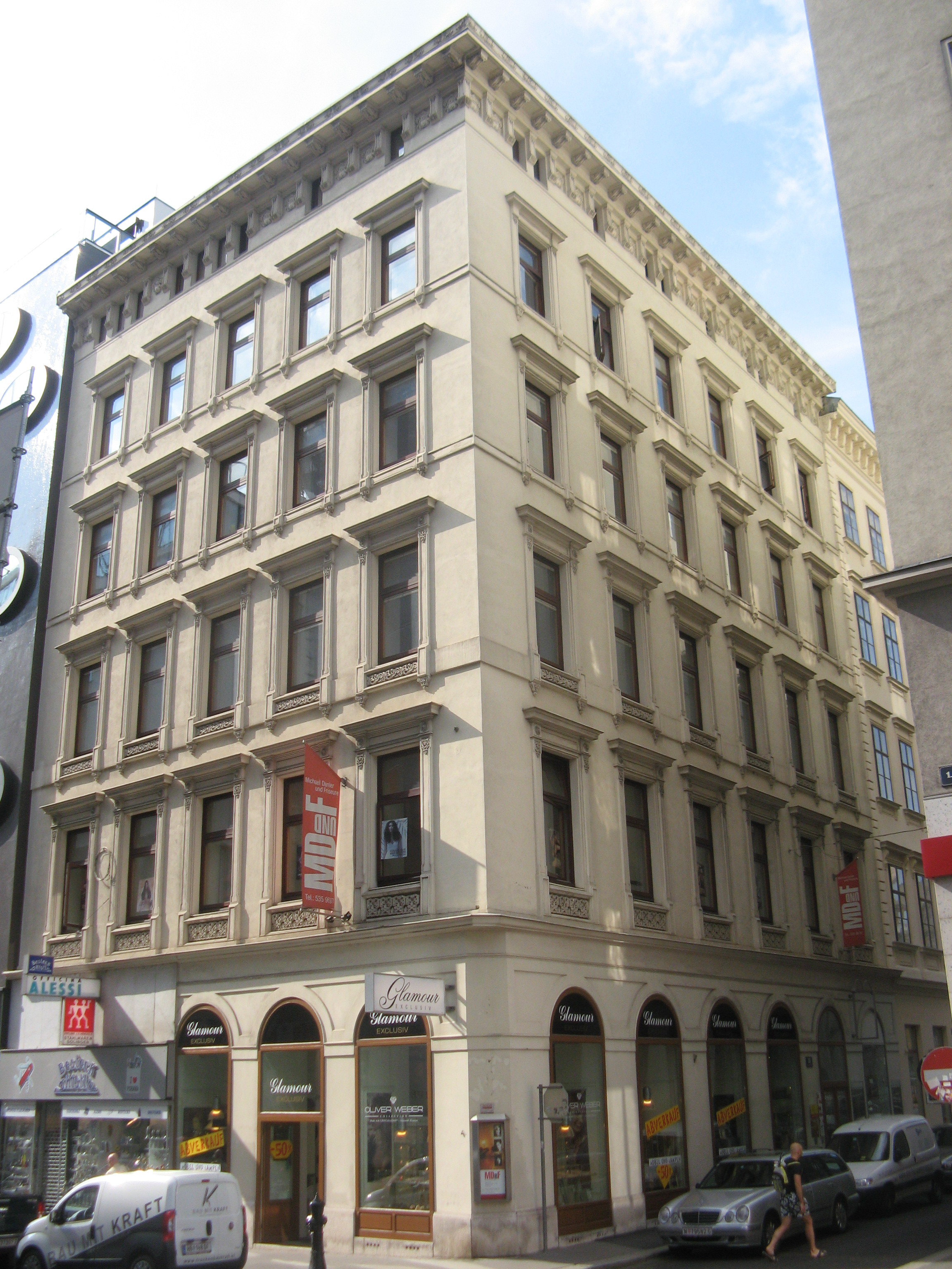 Frühhistoristisches Eckhaus (1843) von Karl Högl, Bauernmarkt 18, Wien-Innere Stadt